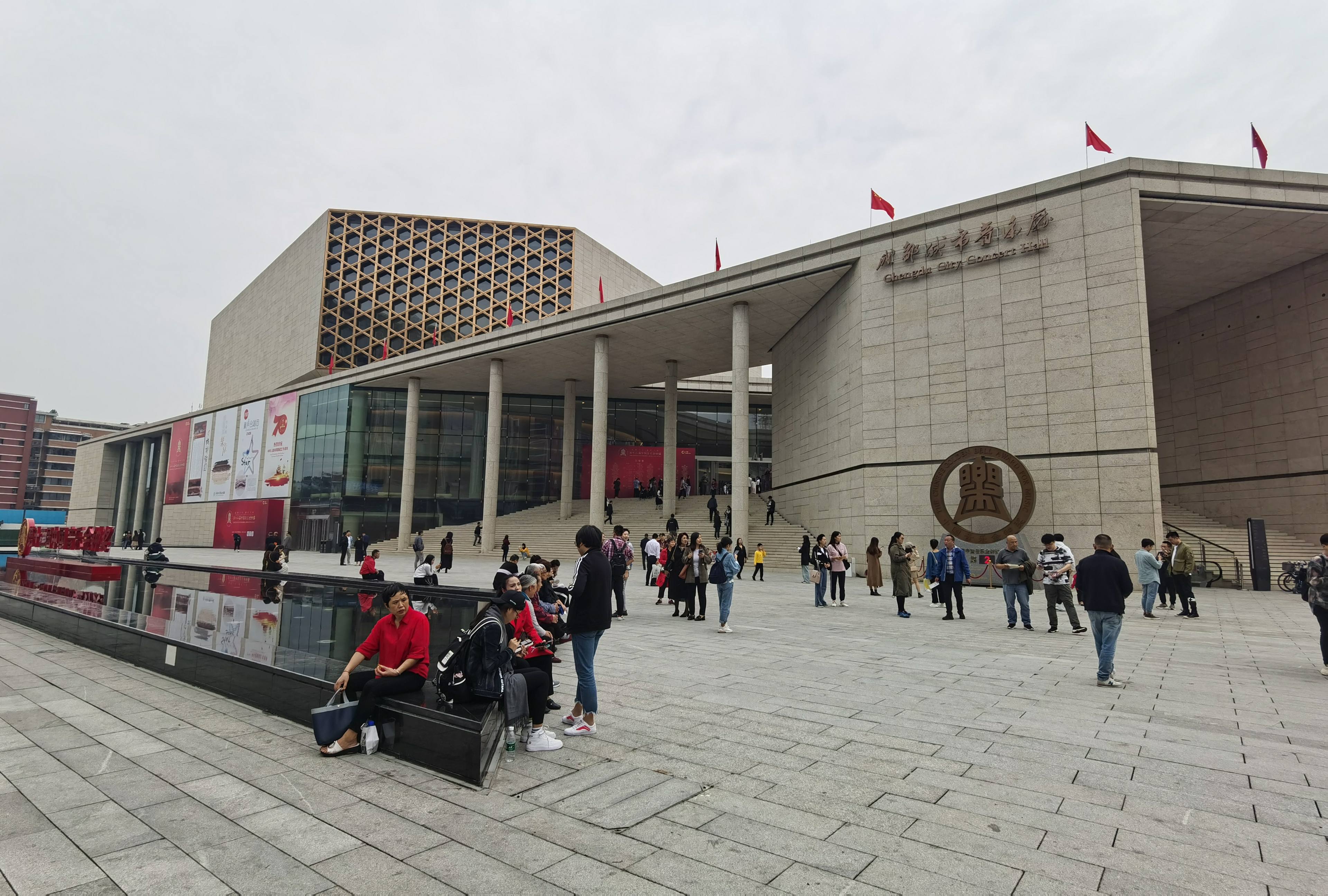 中文（中国大陆）: 成都城市音乐厅，建筑正面照